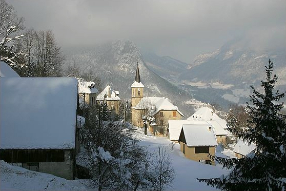 Village de La Ruchère Commune de saint Christophe sur Guiers Isère France